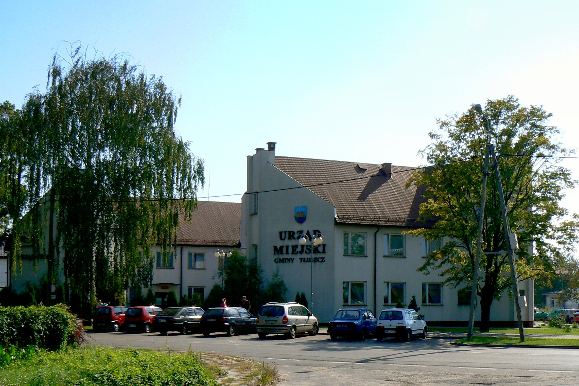 Tłuszcz, siedziba Urzędu Gminy